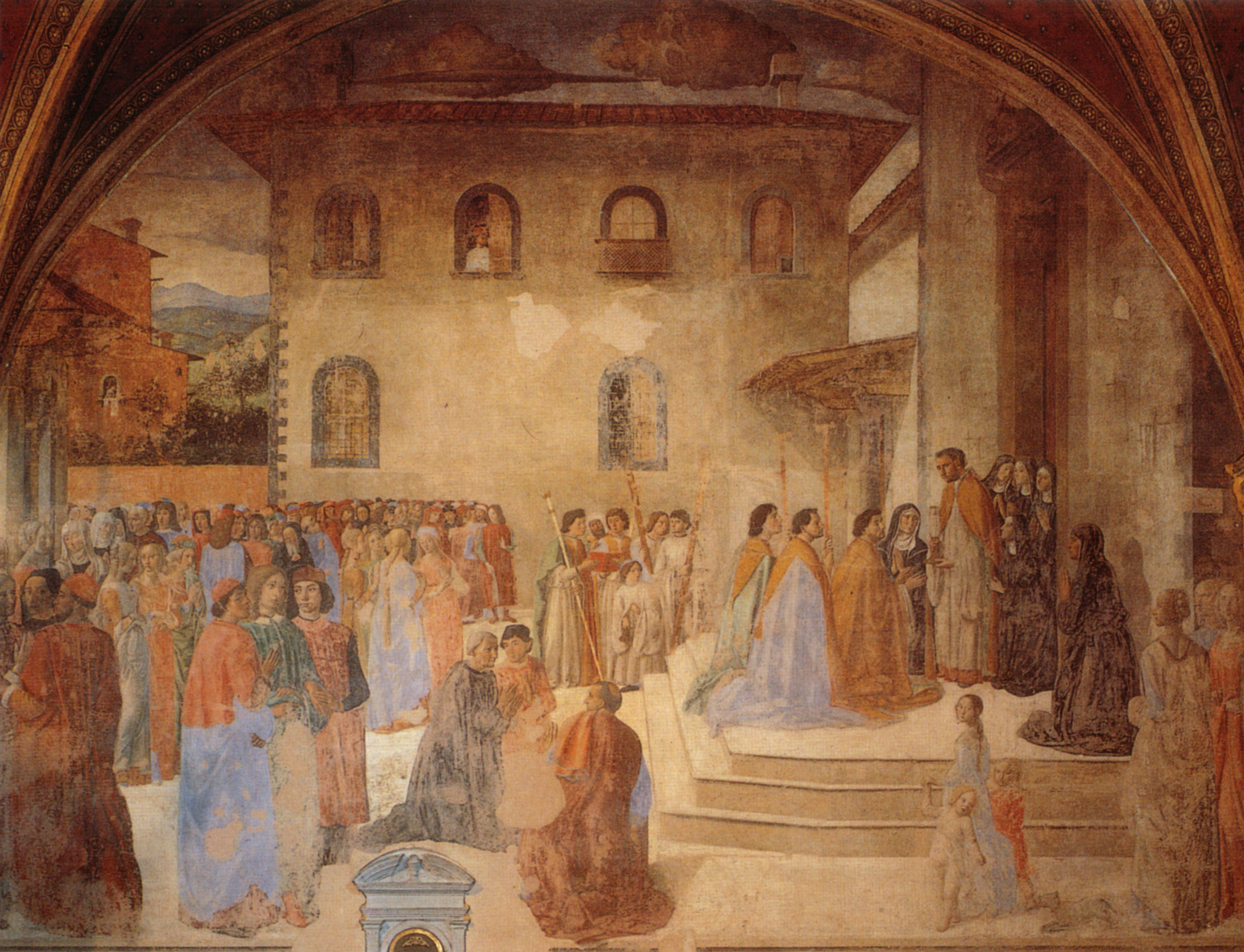 Cappella del miracolo, cosimo rosselli, miracolo del calice